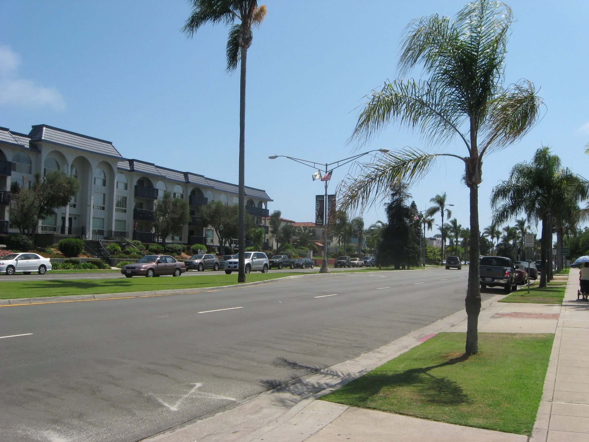 Orange Avenue in Coronado.